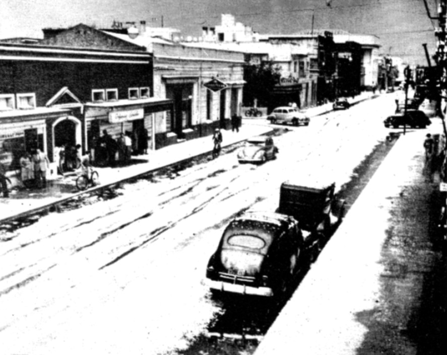 Calle Rivadavia durante la nevada del 7 de julio de 1955. Junín, Argentina.